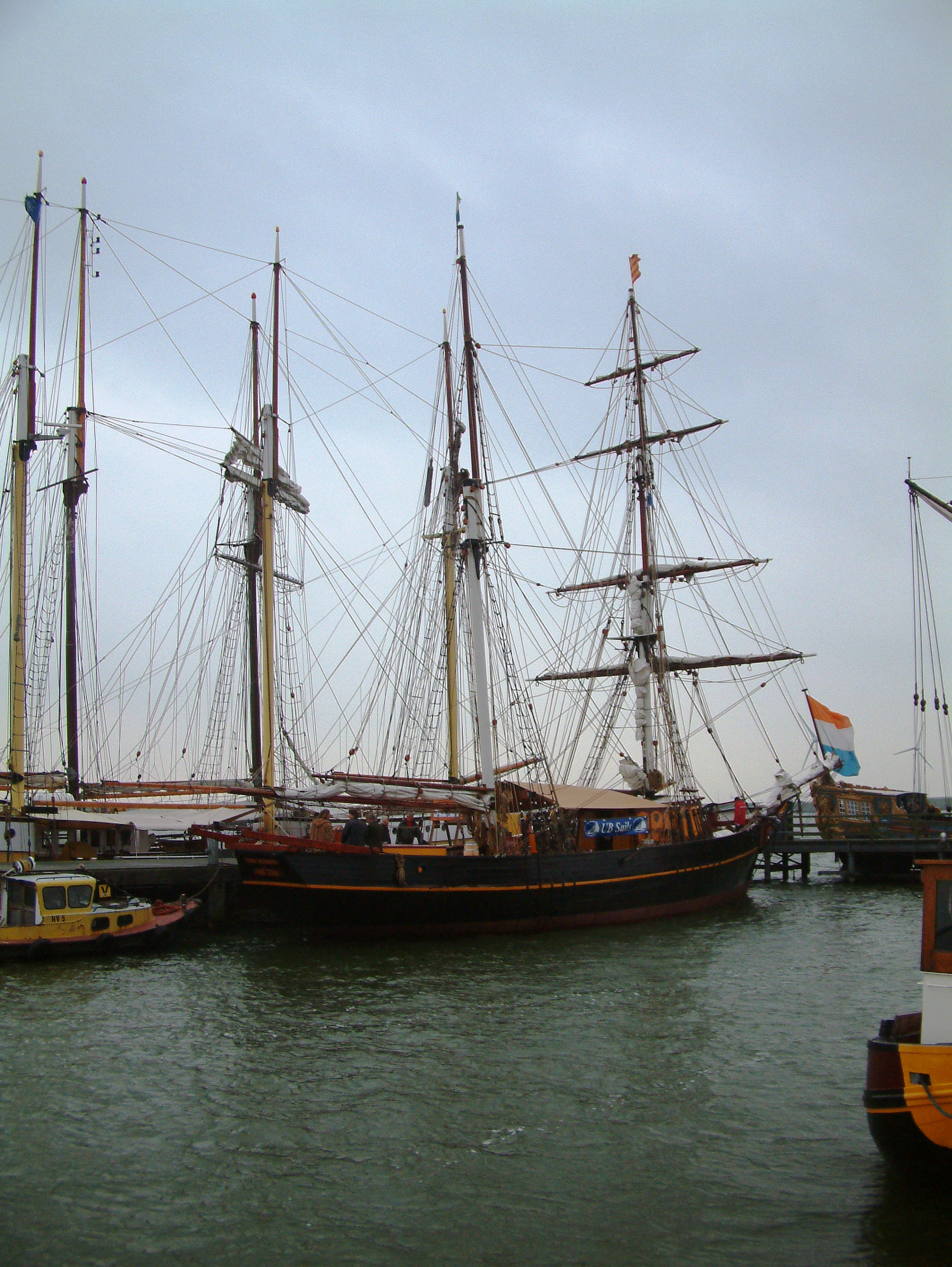 De TRES HOMBRES is een zeilend vrachtschip, dat probeert de zeilende handelsvaart nieuw leven in te blazen.